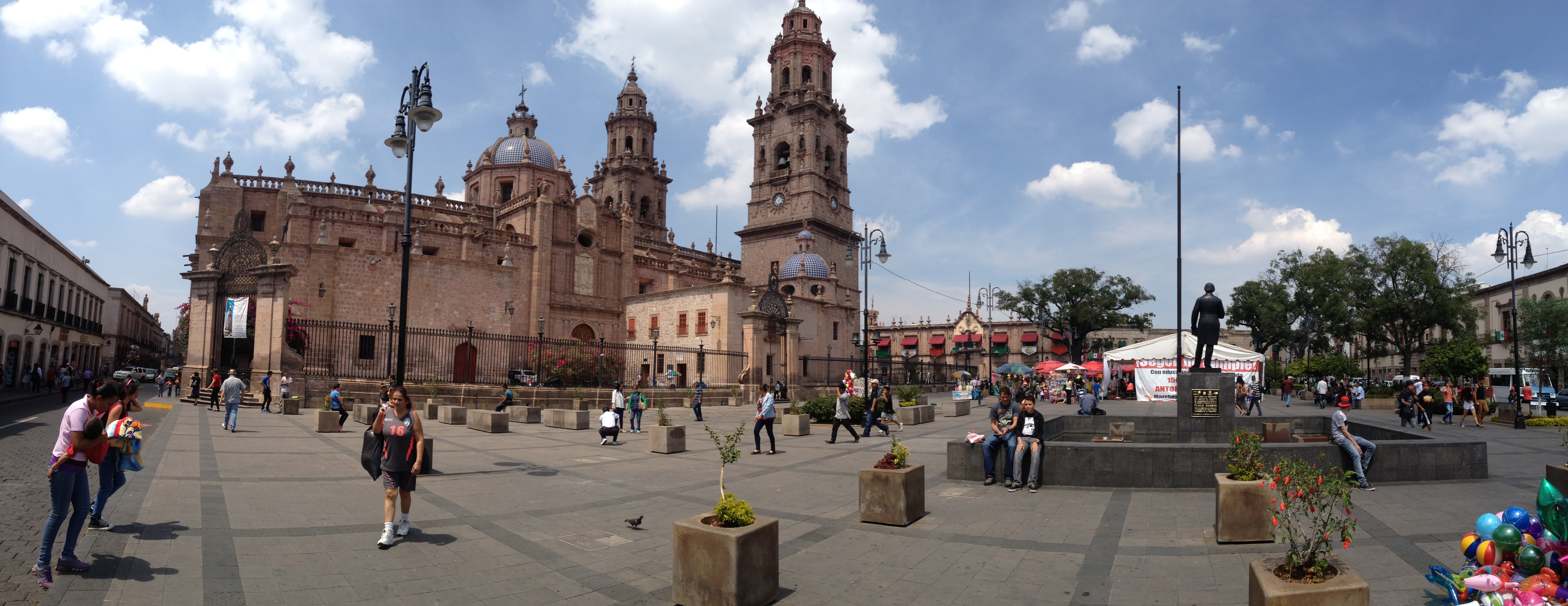 La bella catedral de la ciudad de Morelia